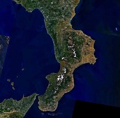 Calabria, an Italian region